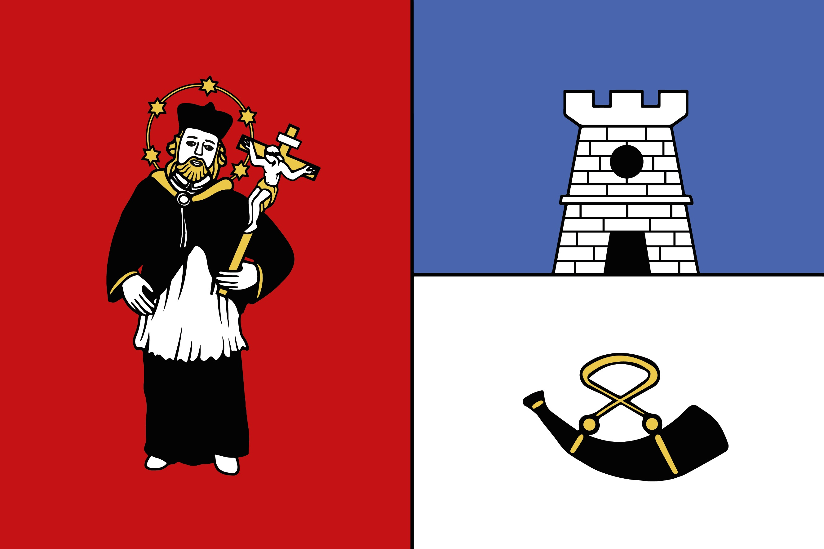 Vlajka obce Sudslava